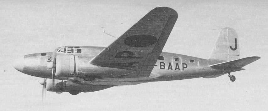 三菱MC-20-I J-BAAP 空飛ぶ編輯室・朝日新聞社 「朝雲号」 Mitsubishi MC-20-I with a nickname Asagumo (morning cloud) used by Asahi Shimbun. This aircraft was publicized as the 'flying editorial office' since all the equipment necessary for writing & sending newspaper articles was placed inside.